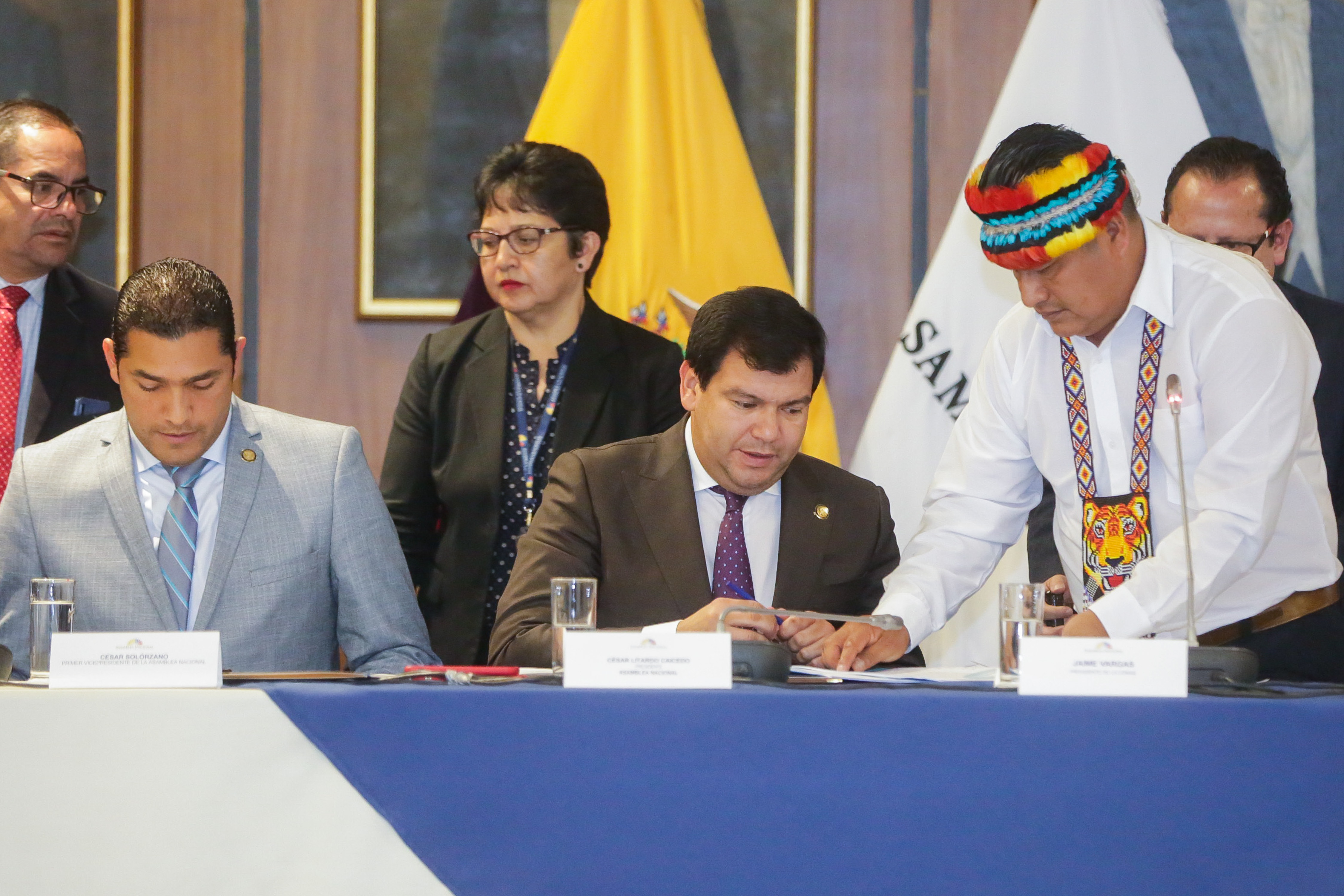 Presidente de la Asamblea Nacional, César Litardo recibió del Parlamento Popular de los Pueblos de Ecuador, liderado por la CONAIE la propuesta alternativa a la Ley Crecimiento Económico. Fotos: Alexander Moya / Asamblea Nacional